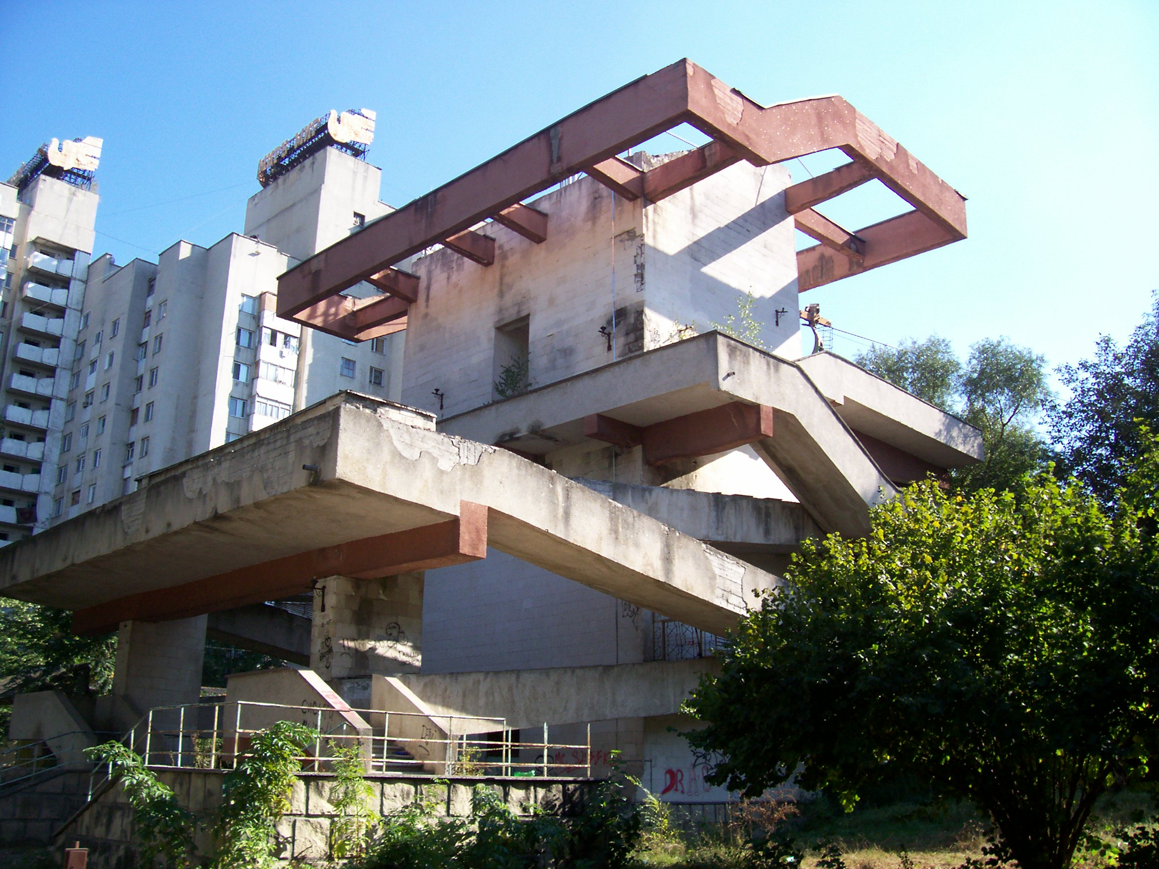 нижняя станция кишинёвской канатной дороги